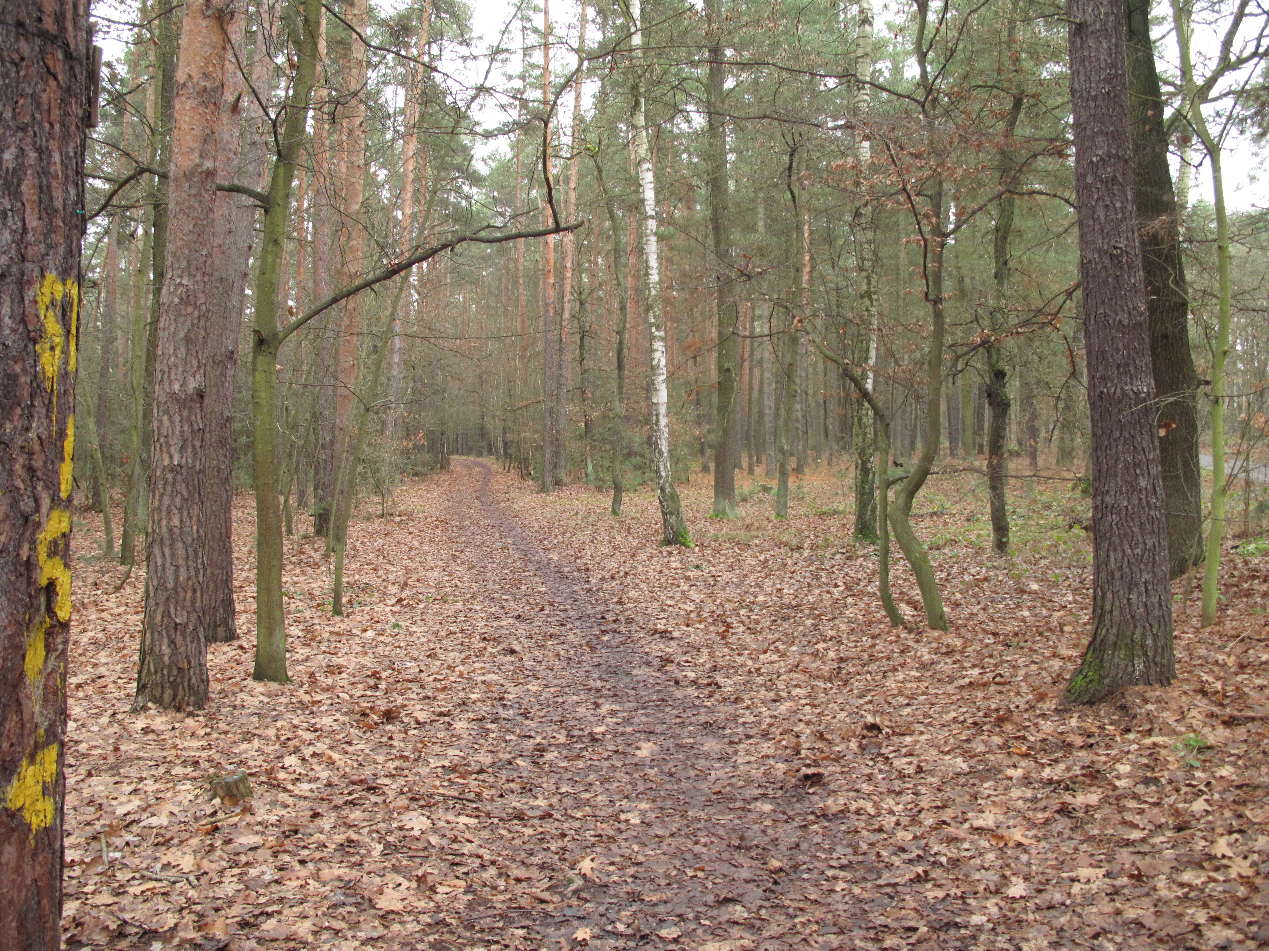 Zátopkovy běžecké stezky nedaleko Staré Boleslavi, Česká republika.